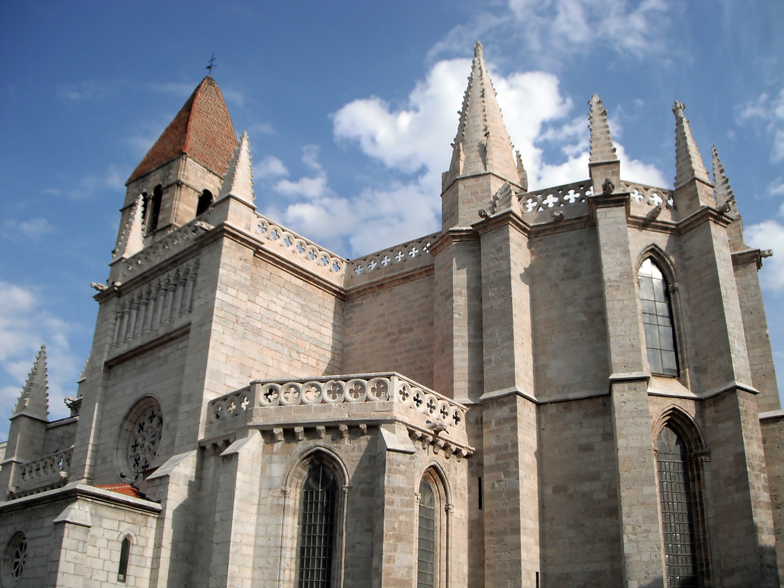 Iglesia de Santa María de la Antigua en Valladolid